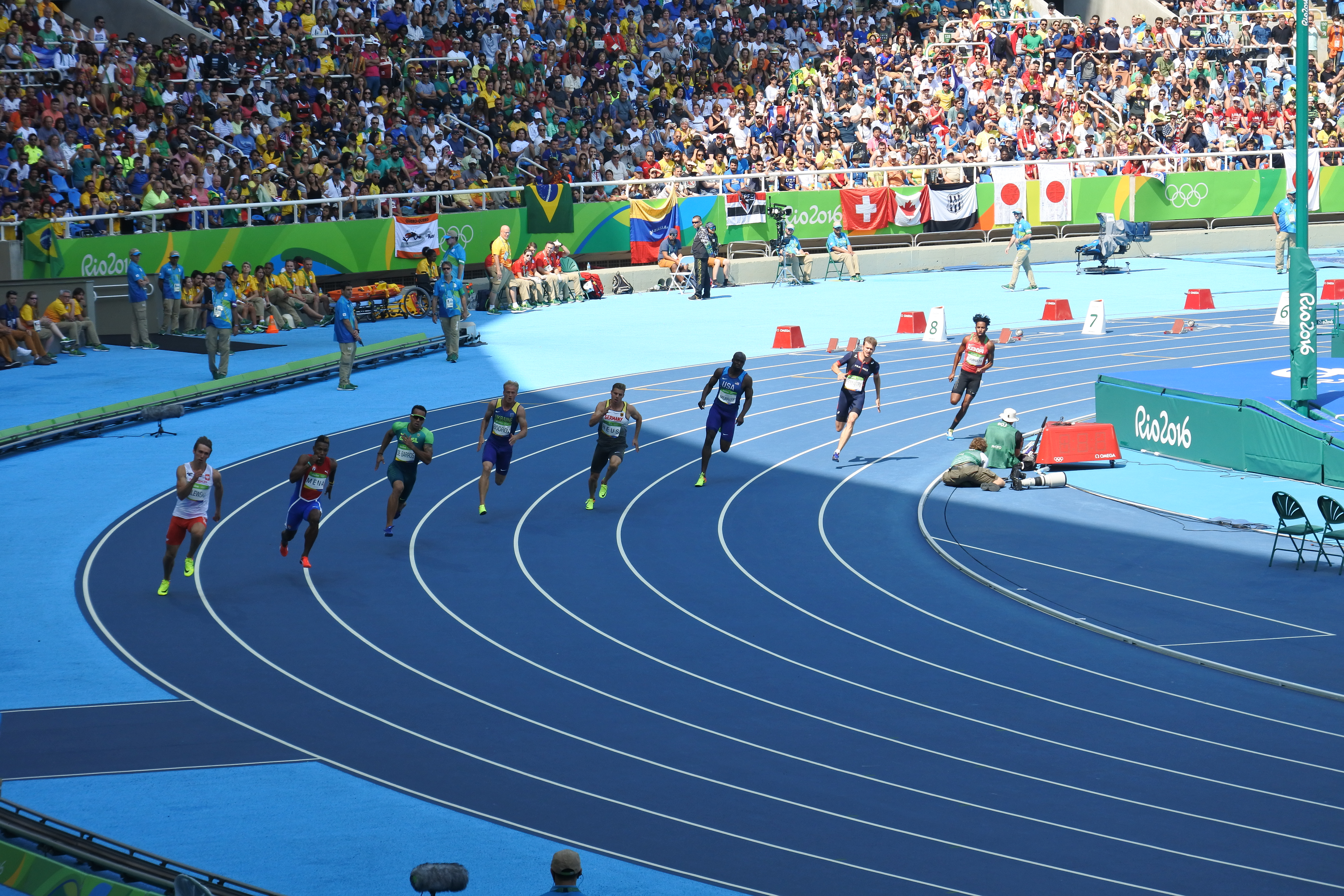 Rio 2016 - Eliminatórias 200m Masculino